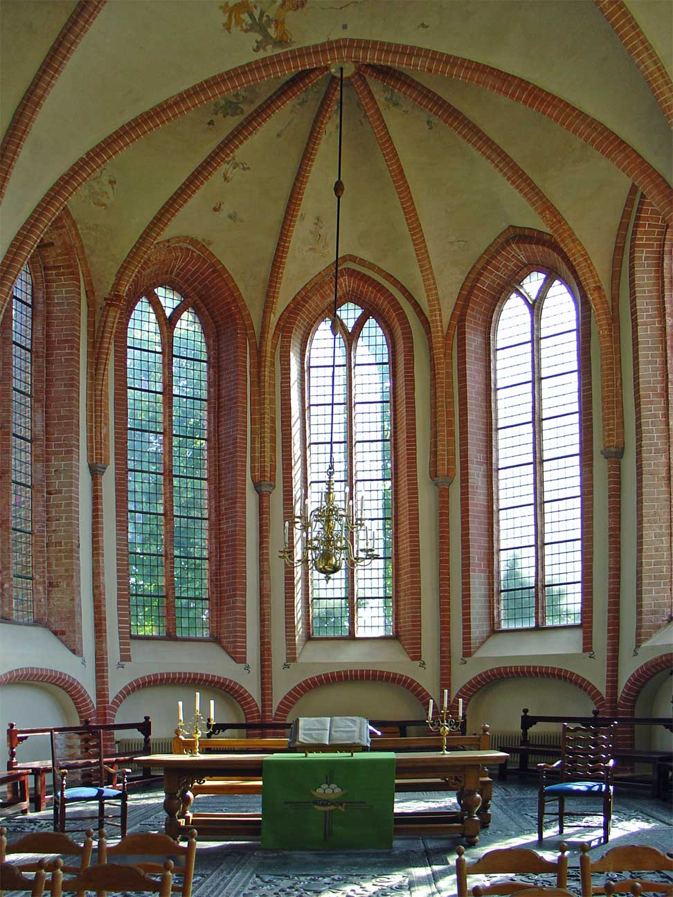 Koor van de Sint Maartenskerk van Kollum)